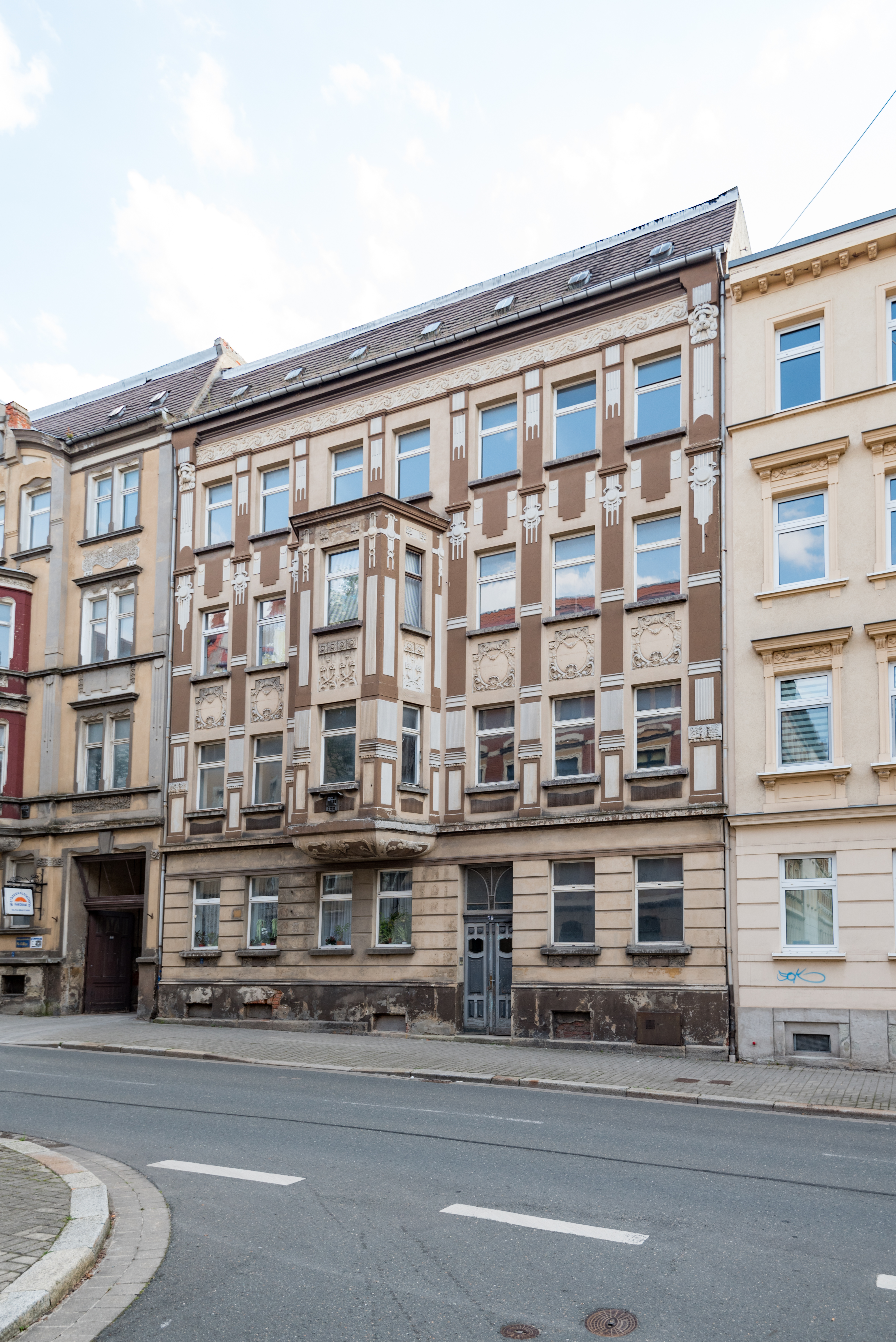 Zeitz, August-Bebel-Straße 58